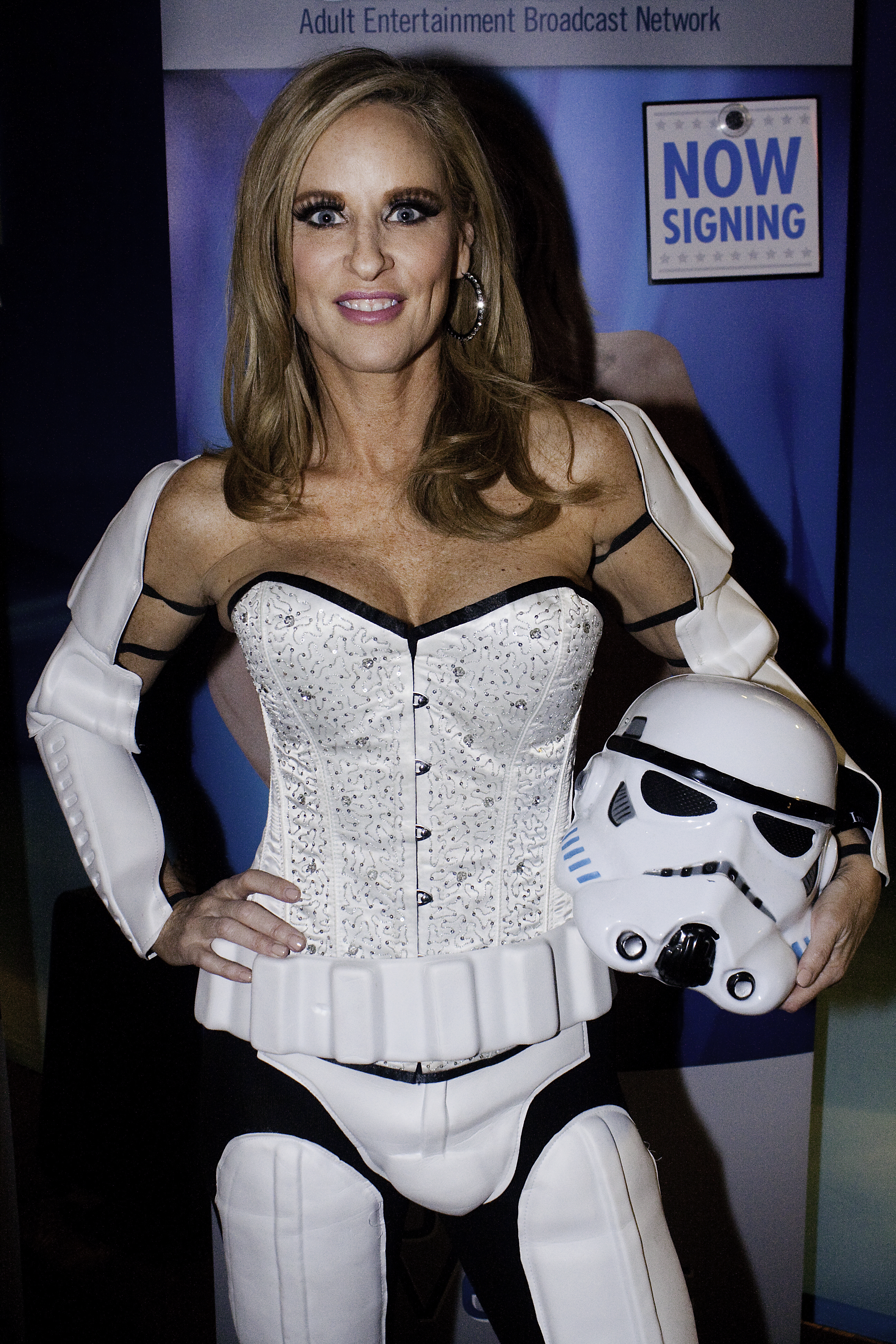 AEE16_0157bas